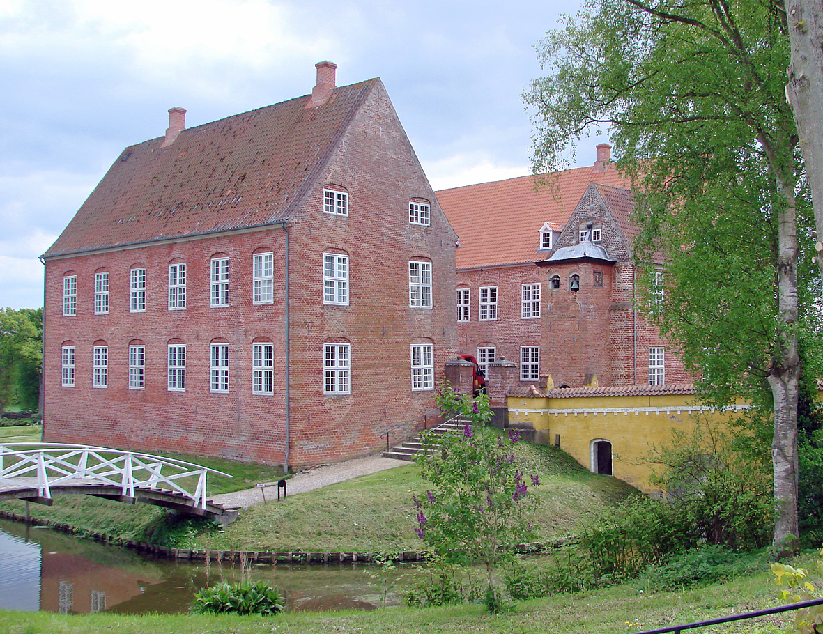 Støvringgaard ligger i Støvring Sogn, Støvring Herred, ved Randers.